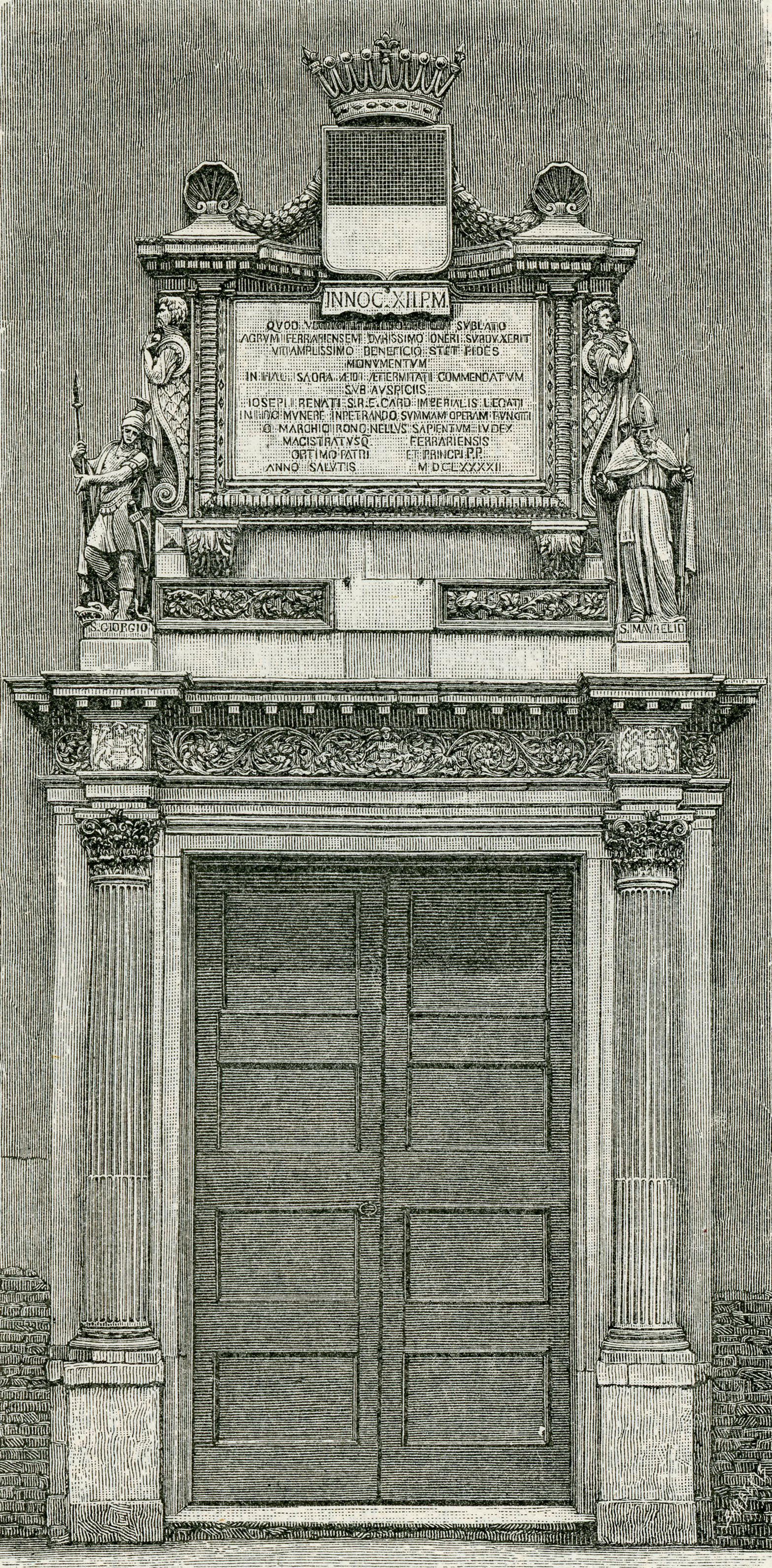 Ferrara: porta della chiesa di San Maurelio, detta Chiesa Nuova, (xilografia di Giuseppe Barberis).